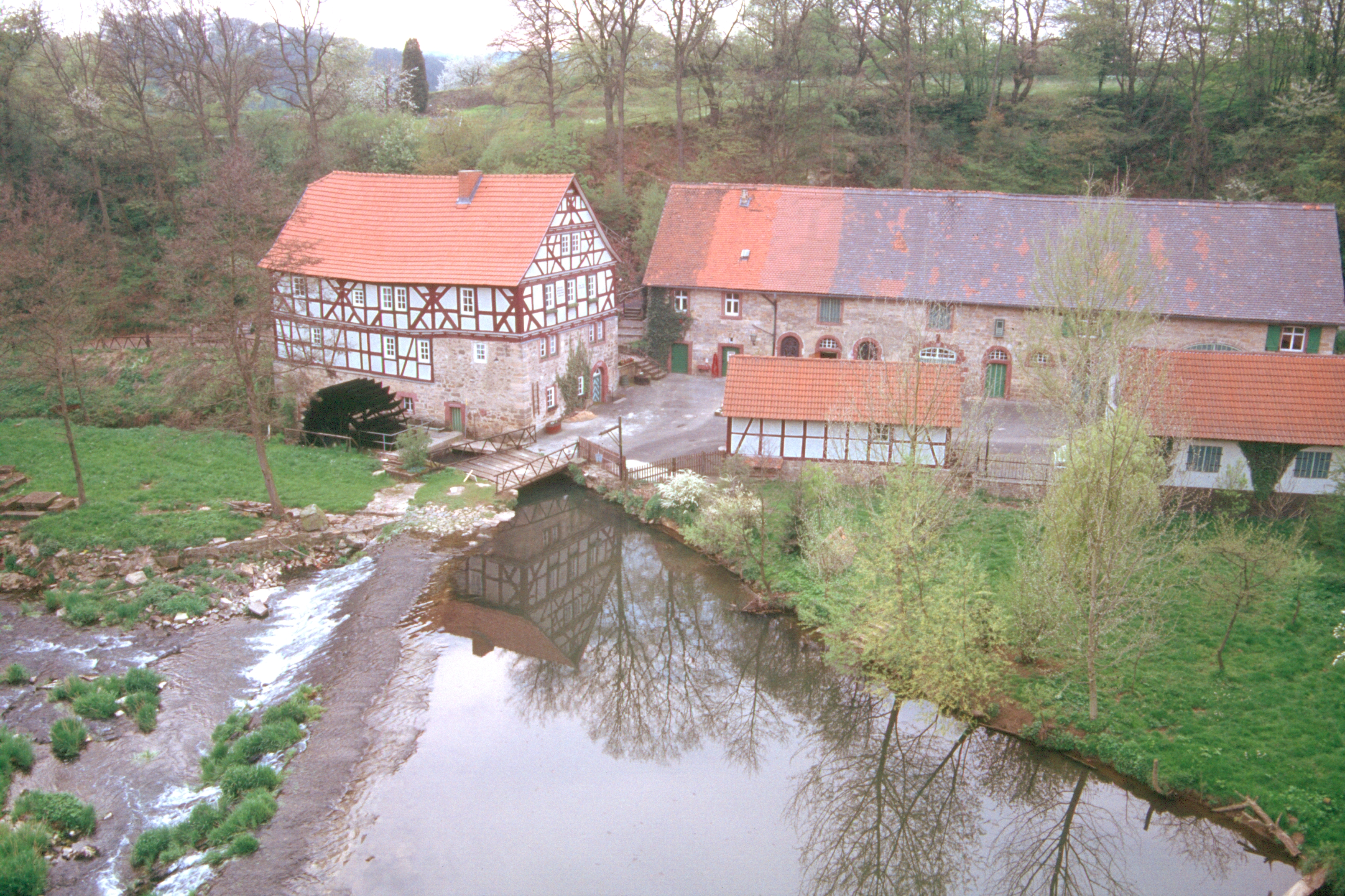 Homberg/Ohm Sandmühle Mai 1990 Digitalisiertes Dia